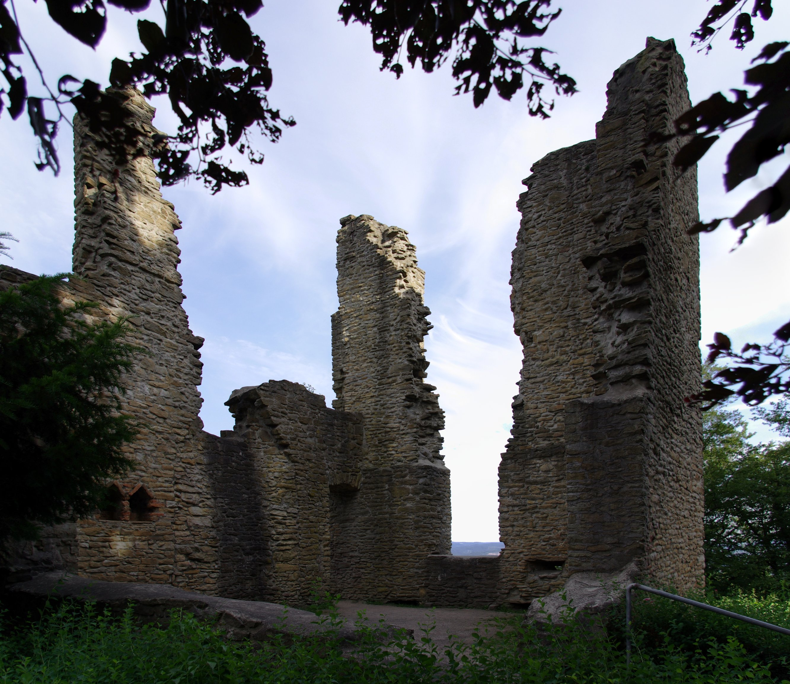 Ruine Hohensyburg auf dem Syberg in Dortmund-Syburg